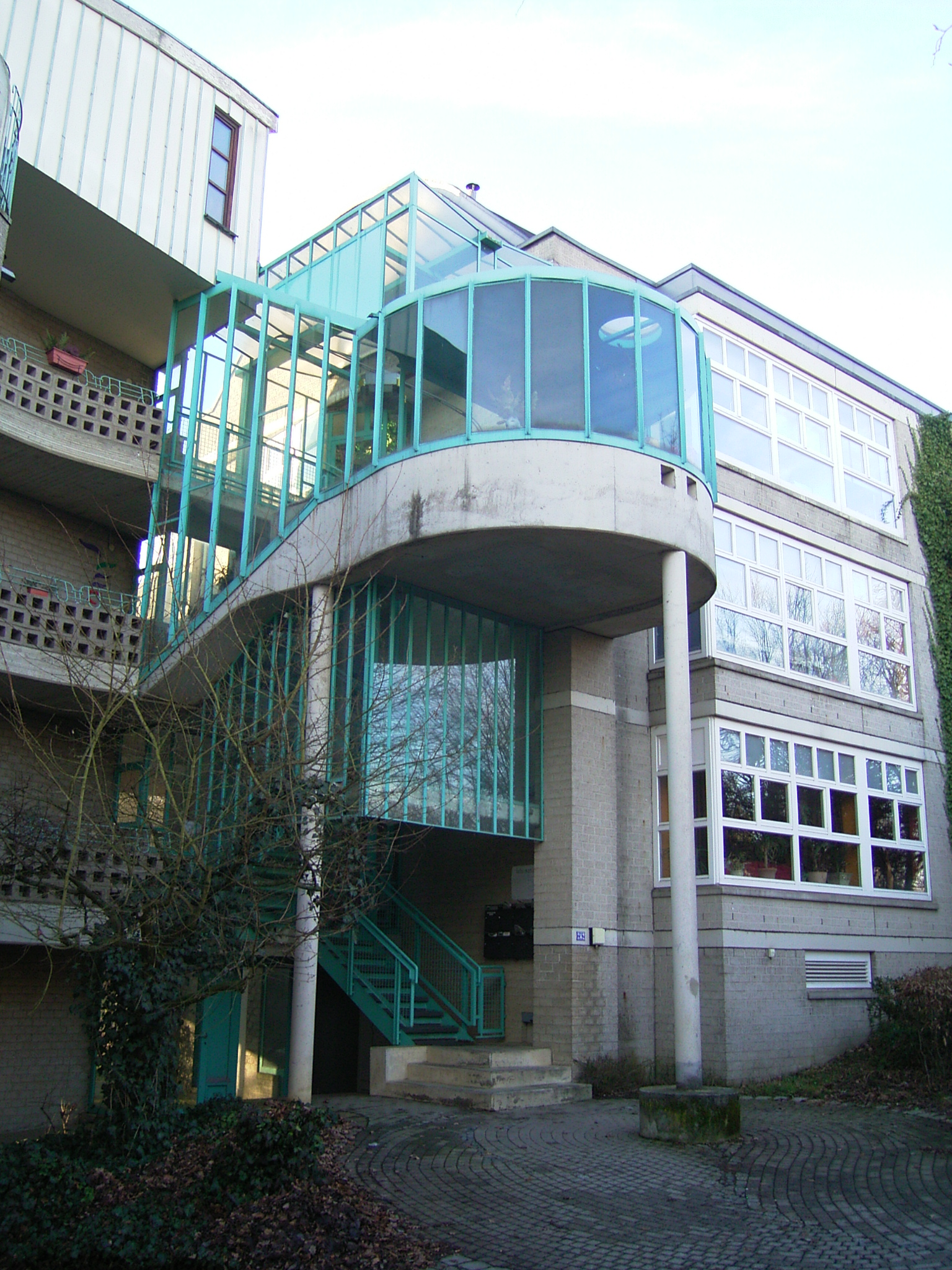 documenta urbana Wohngebäude in Kassel 1979-1982. Erschließung der „Wohnschlange“ Baller und Hertzberger.